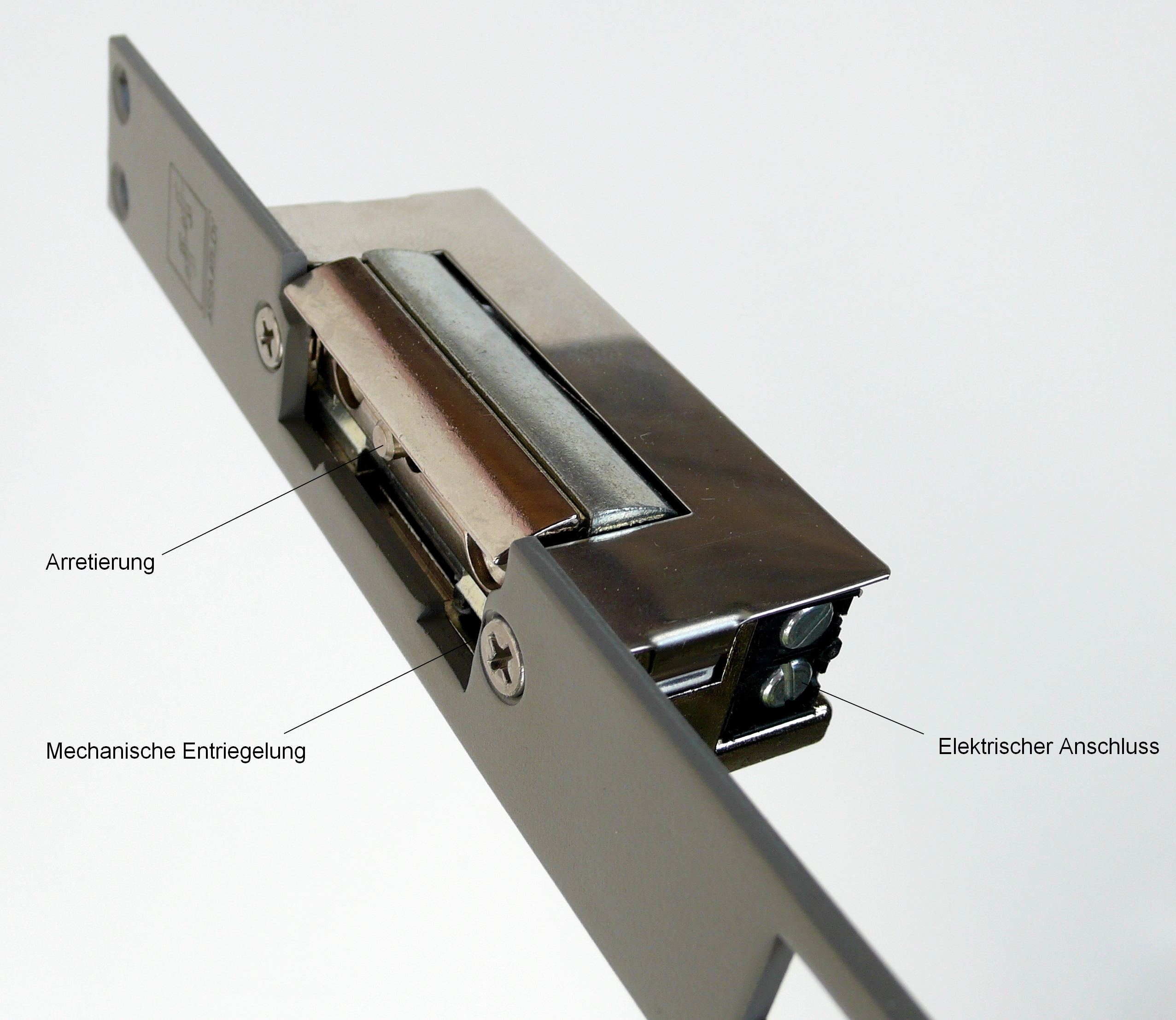 Der schlossfallengesteuerte Arretierungsstift in der Mitte der Türöffnerfalle hält den Türöffner auch nach der Kontaktgabe noch solange entriegelt, bis die Tür geöffnet wird.